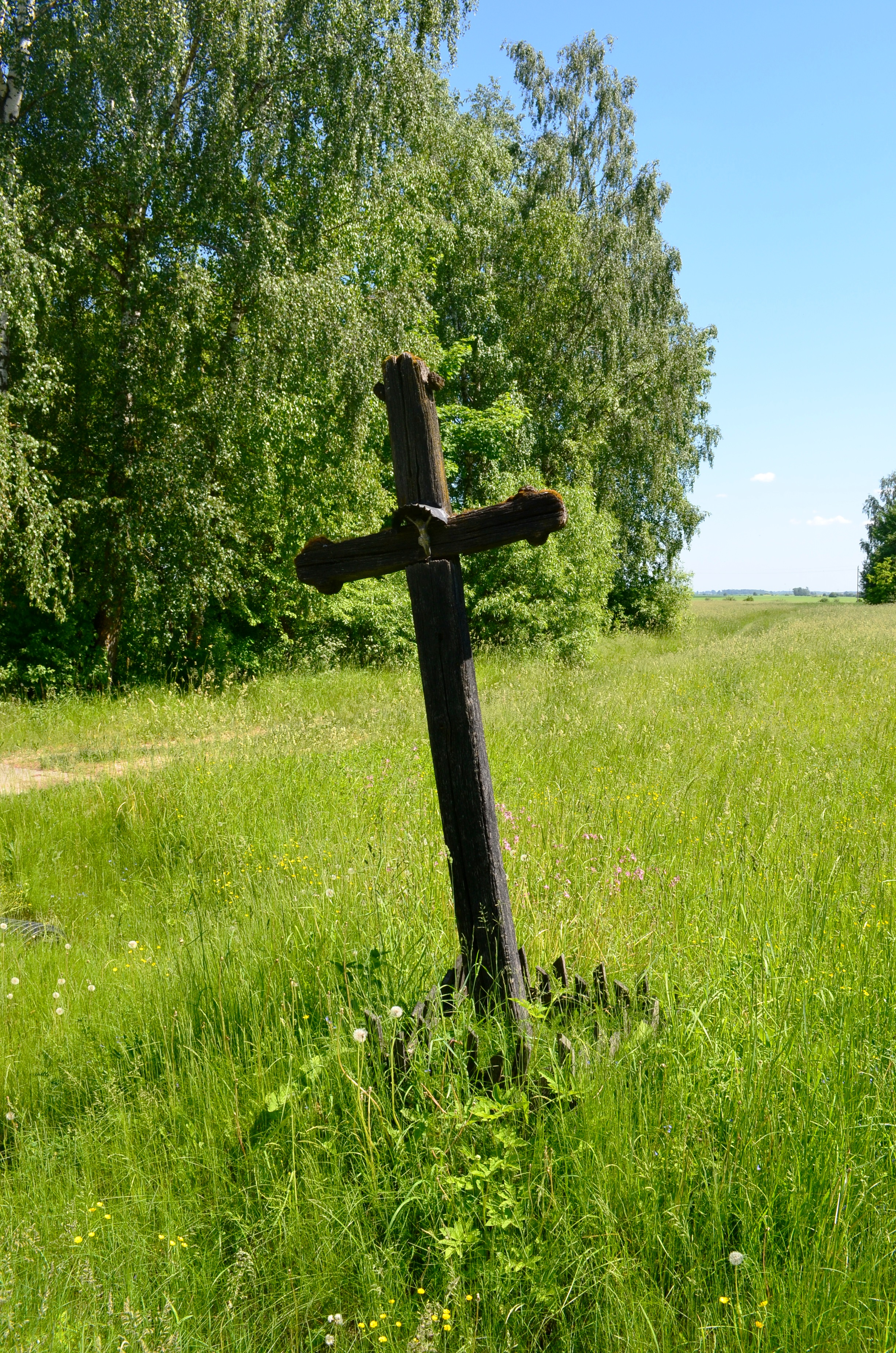 Binėnų medinis kryžius, Pakruojo raj.